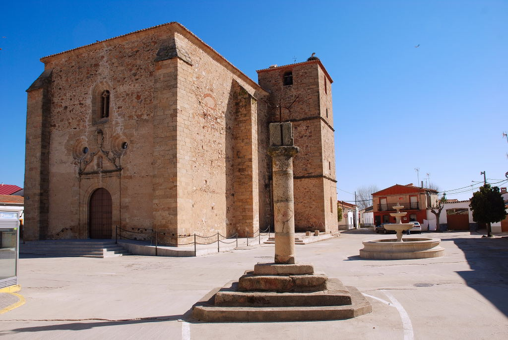 Iglesia de San Juan Bautista de Saucedilla (prov. de Cáceres)